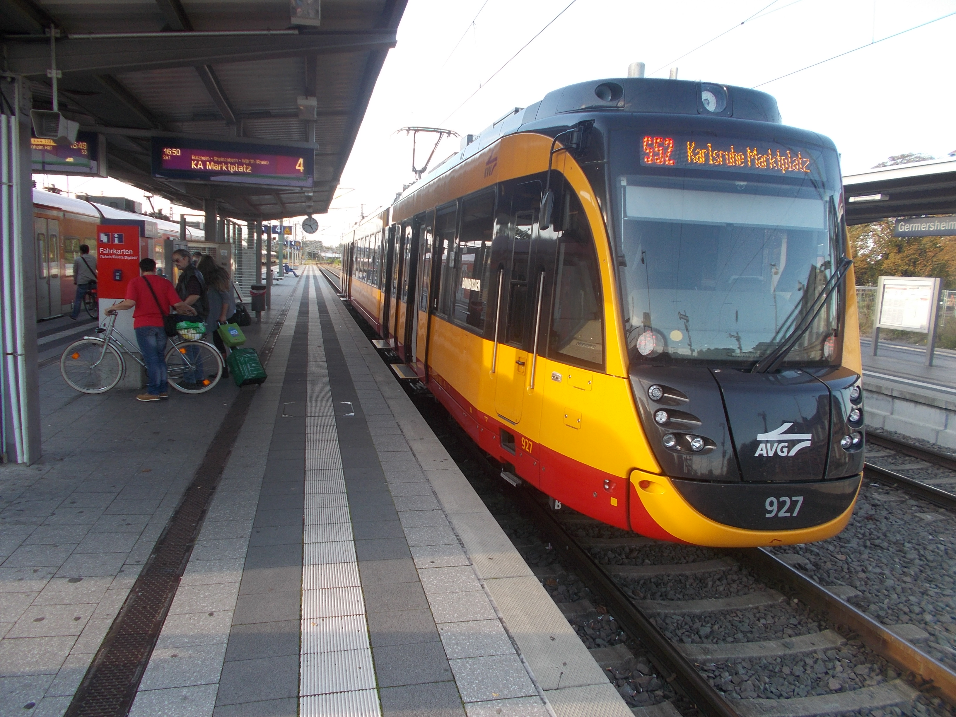 Stadtbahnwagen der Straßenbahn Karlsruhe am Bahnhof Germersheim